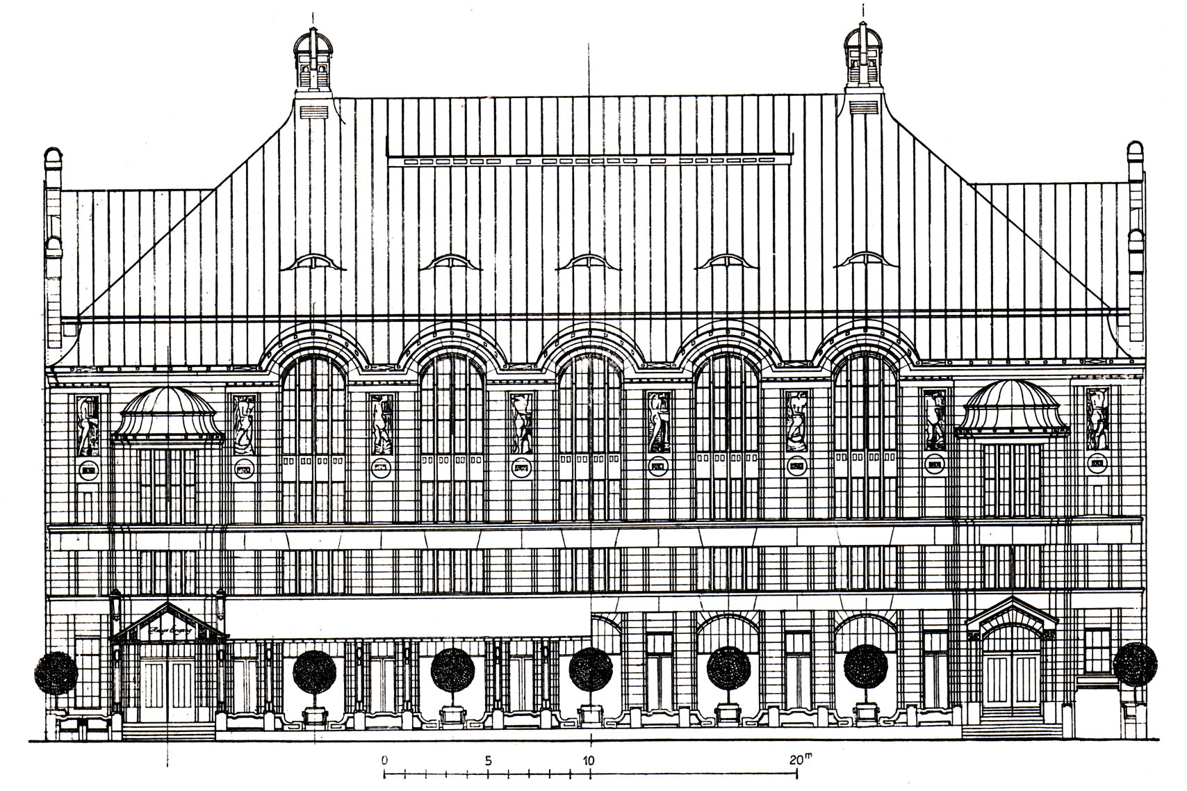 Berlin - Weinhaus Rheingold, Ansicht der Fassade Bellevuestraße